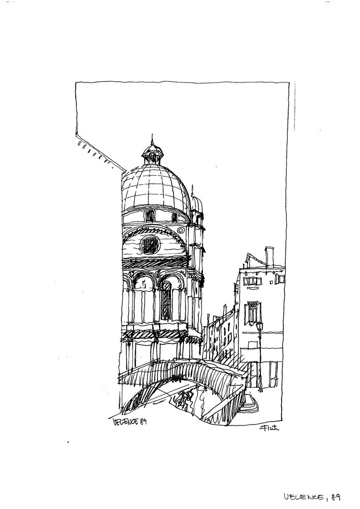 Velence, Olaszország (útirajz)